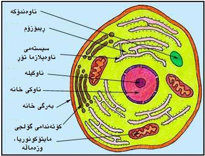 Kurdî: ئەمە وێنەیێکی خانەیە لەگەڵ ئو بەشانەی لە ناو ئەودا ھەن.